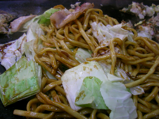 closeupYakisoba @ Mifune / 美舟の焼きそば